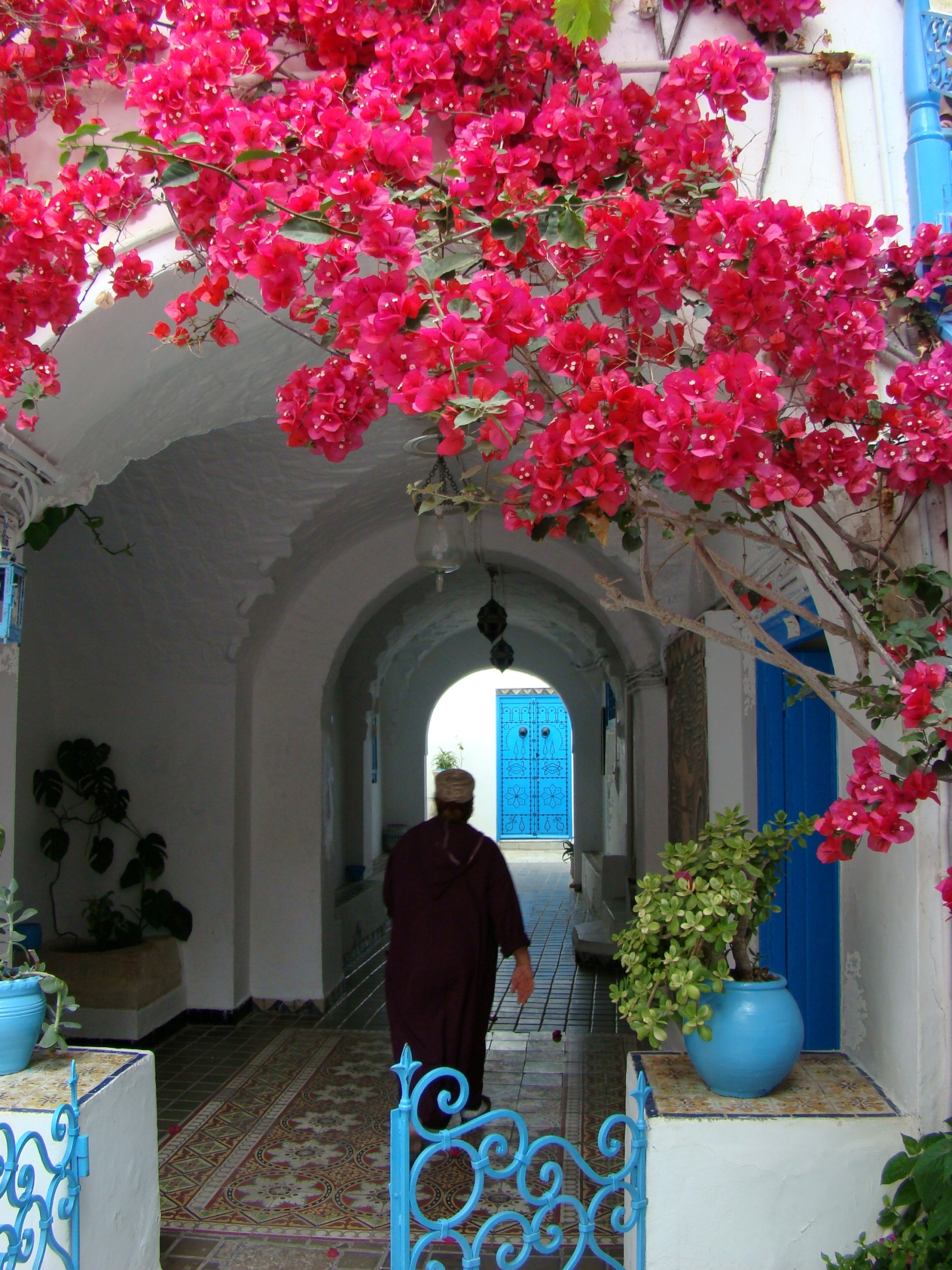 Orientalische Museumsvilla, ehemaliger Haremspalast